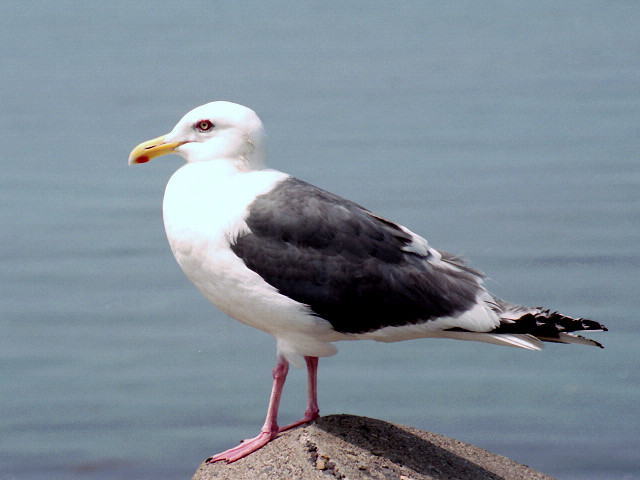 オオセグロカモメ (北海道斜里町) Larus schistisagus (Shari, Hokkaido, JAPAN)